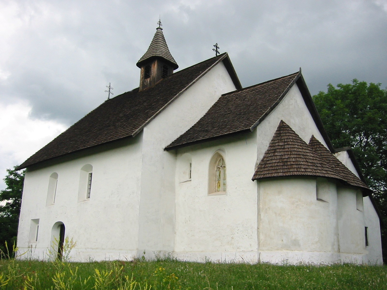 Tornaszentandrás